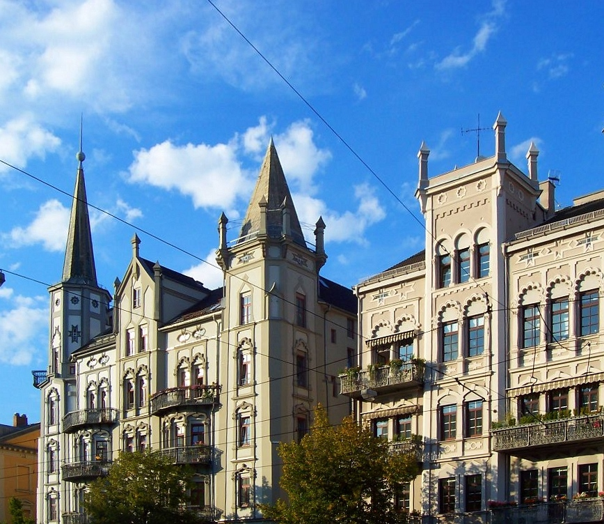 Gollwitzer Häuser